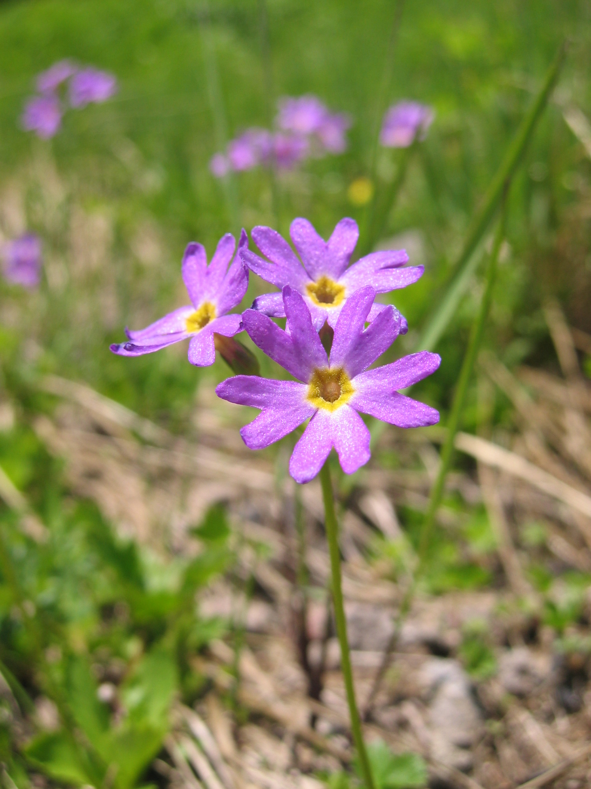 ハクサンコザクラ 白馬乗鞍岳で撮影。